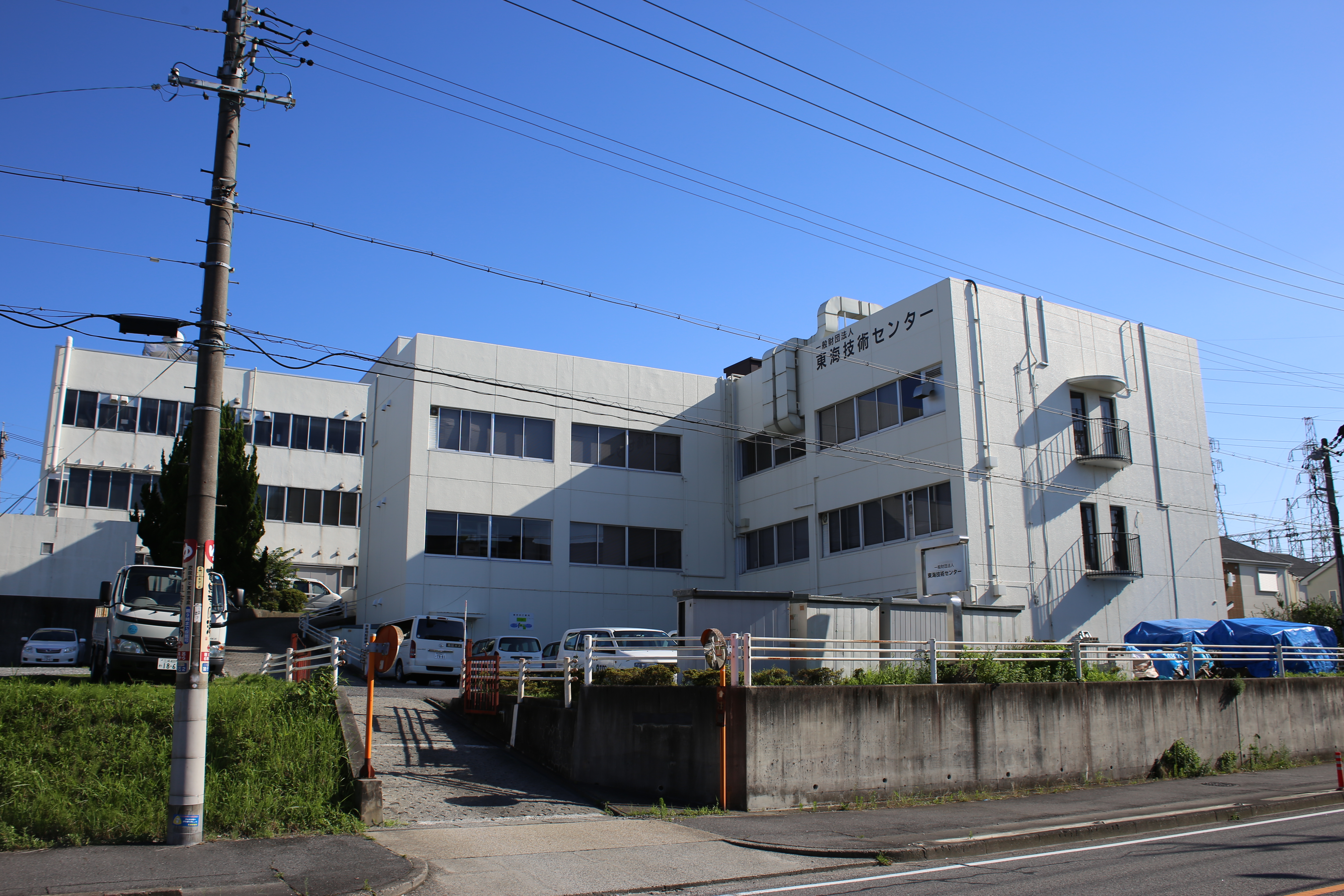 名古屋市名東区猪子石の東海技術センター（TTC）を北側公道東側より撮影